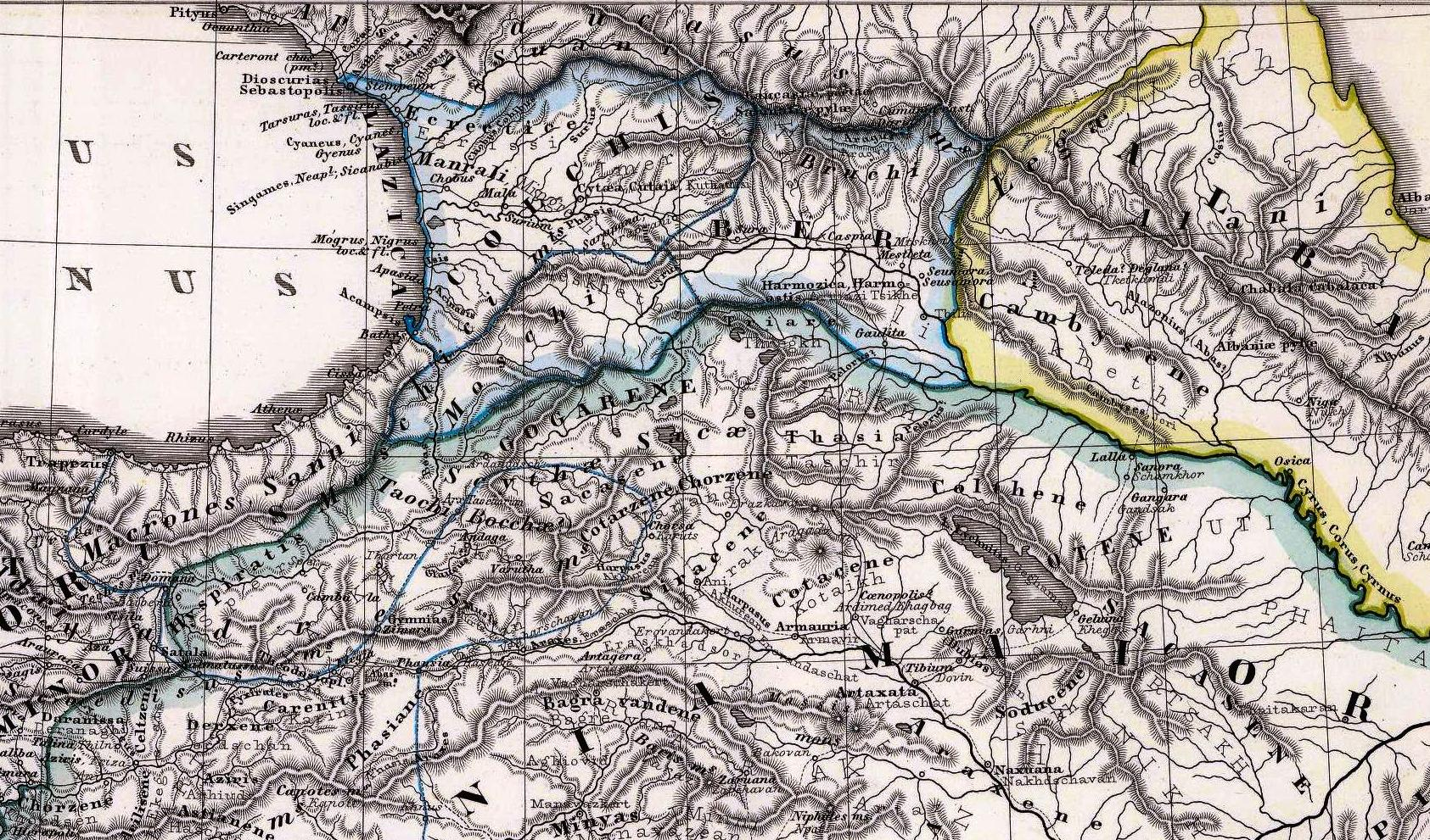 Albania, Iberia, Colchis, Armenia, Mesopotamia, Babylonia, Assyria. Corr. Menke 1863. W. Alt sc. Gothae: Justhus Perthes. Spruner-Menke atlas antiquus. (1865)